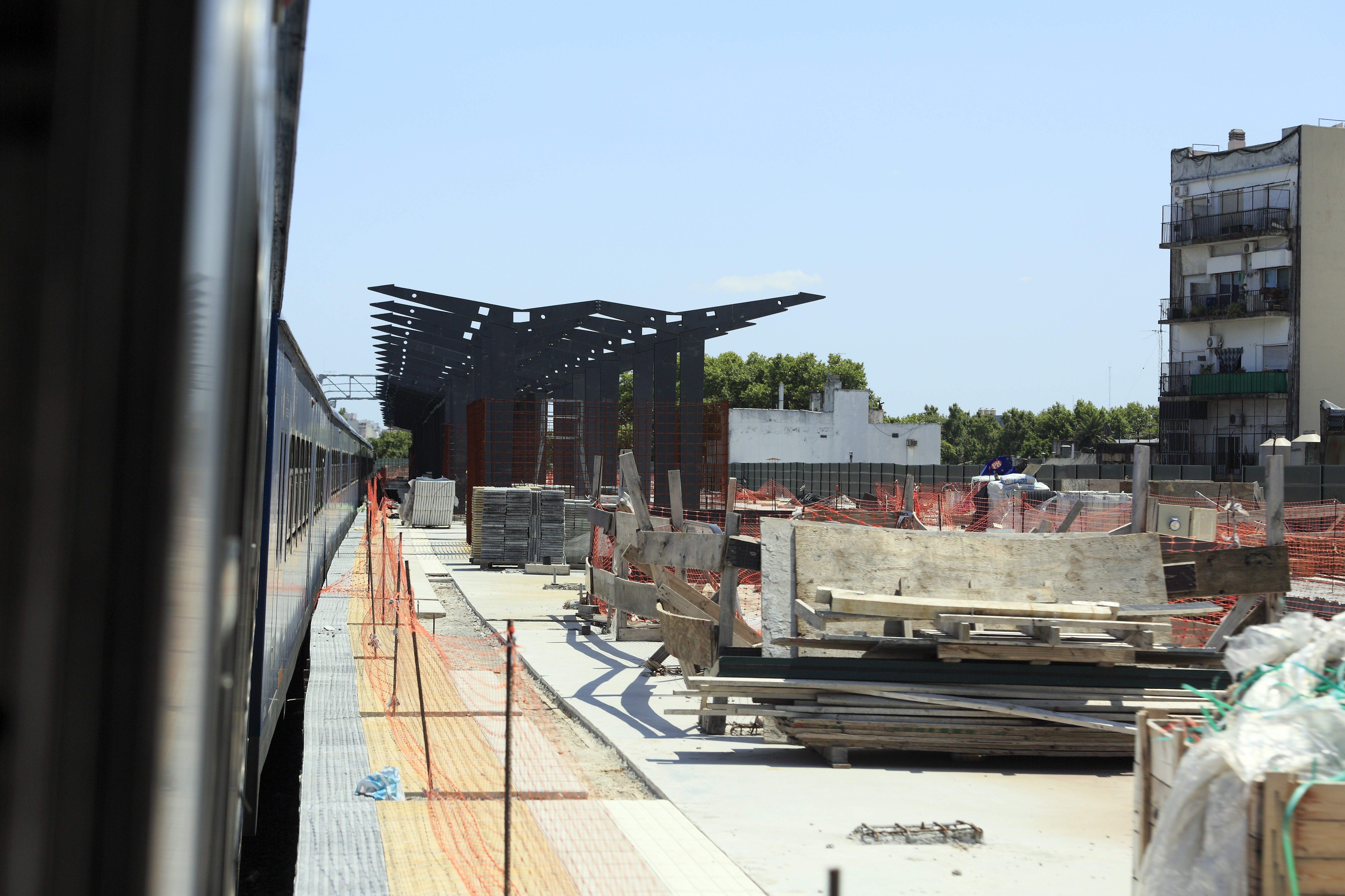 Richtung Dr. Cabred, die Bahnsteige sind im Rohbauzustand. Auf dem südlichen ist das Bahnsteigdach in Arbeit, die Bahnsteigkante ist ebenfalls noch nicht reguliert.